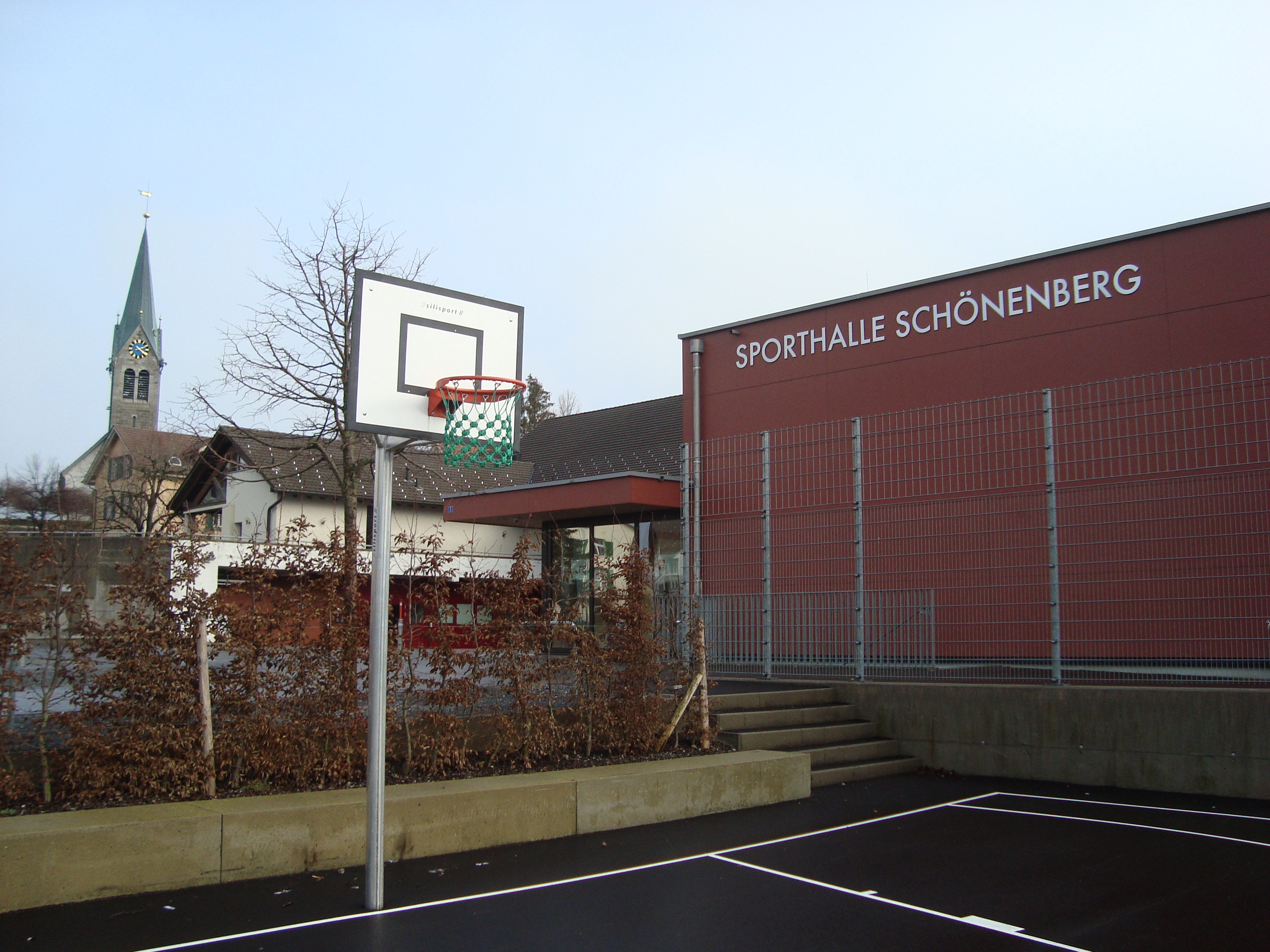 Sporthalle Schönenberg ZH in der Stadt Wädenswil, Kanton Zürich, Schweiz